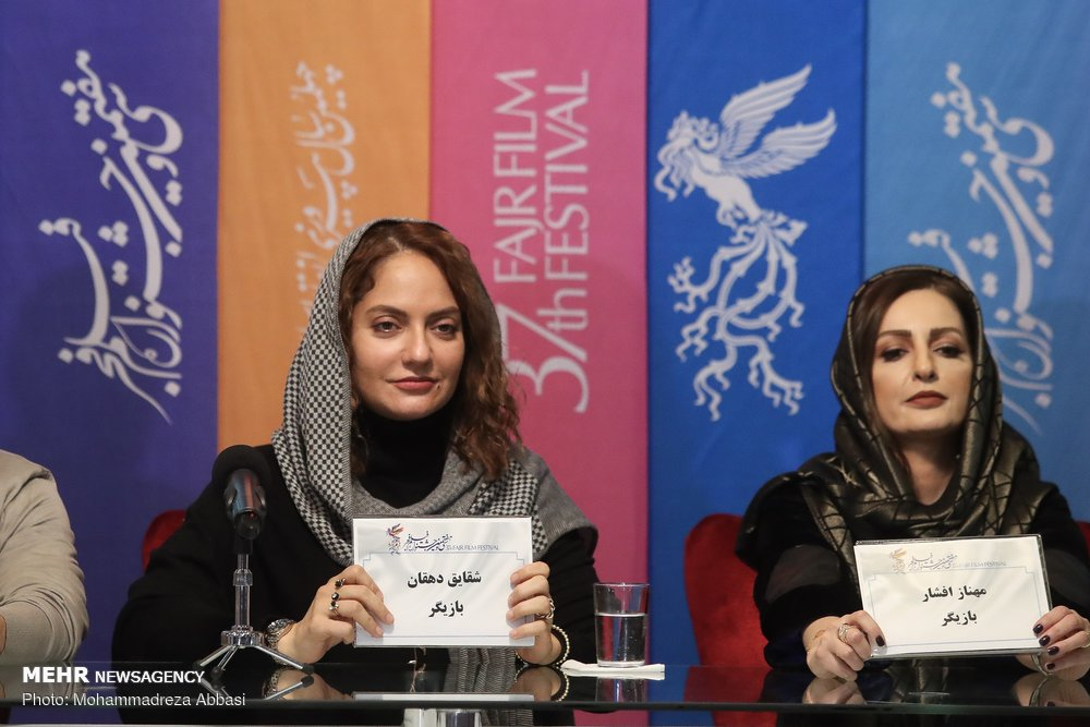 مهناز افشار و شقایق دهقان در نشست خبری فیلم ناگهان درخت، سی و هفتمین دوره جشنواره فیلم فجر